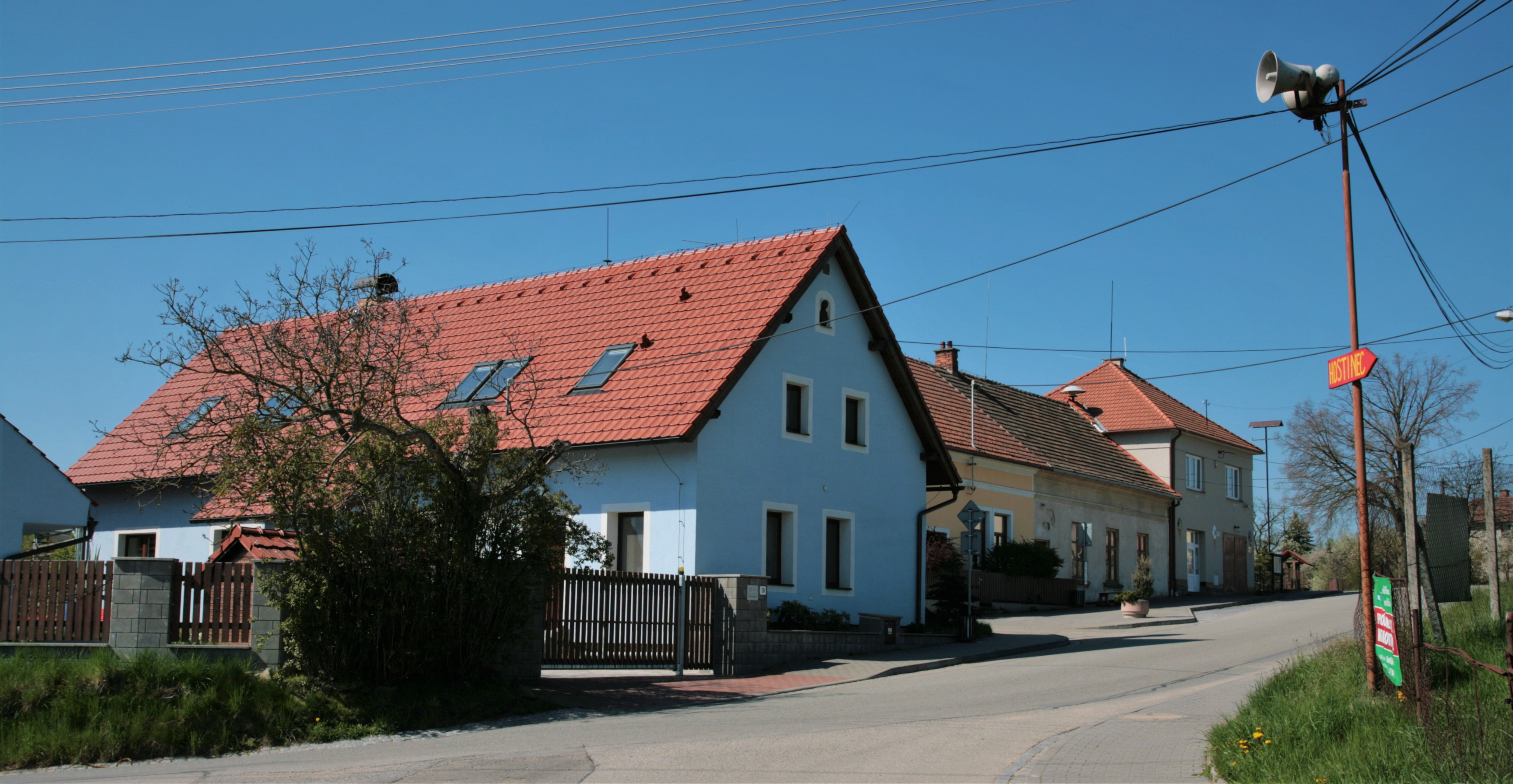 Obec Kuřimské Jestřabí v okrese Brno-venkov. Dům u hlavní křižovatky, v pozadí obecní úřad s hasičskou zbrojnicí.